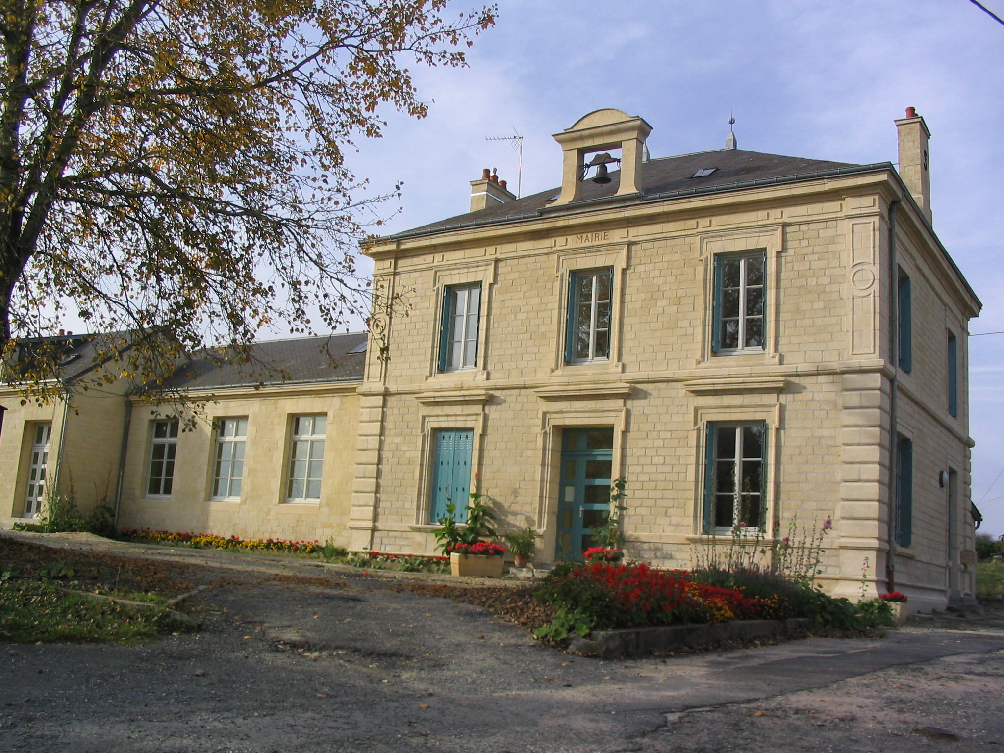 Mairie de Neuville